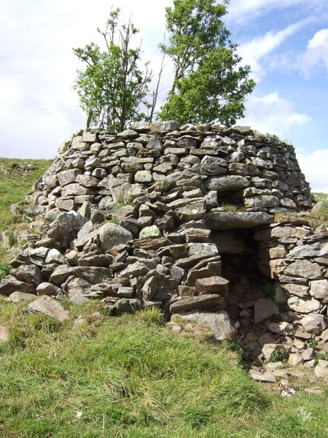 Old lime kiln at Badenyon, Aberdeenshire